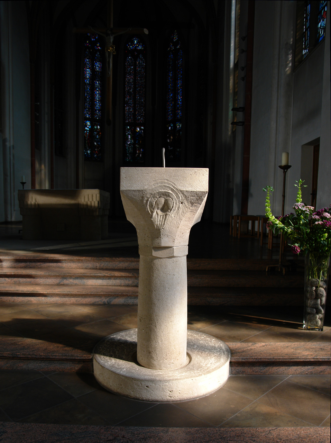 Propsteikirche St. Johann in Bremen. Ambo aus französischem Savonnier-Kalkstein, 1994 vom Rietberger Künstler Johannes Niemeier geschaffen